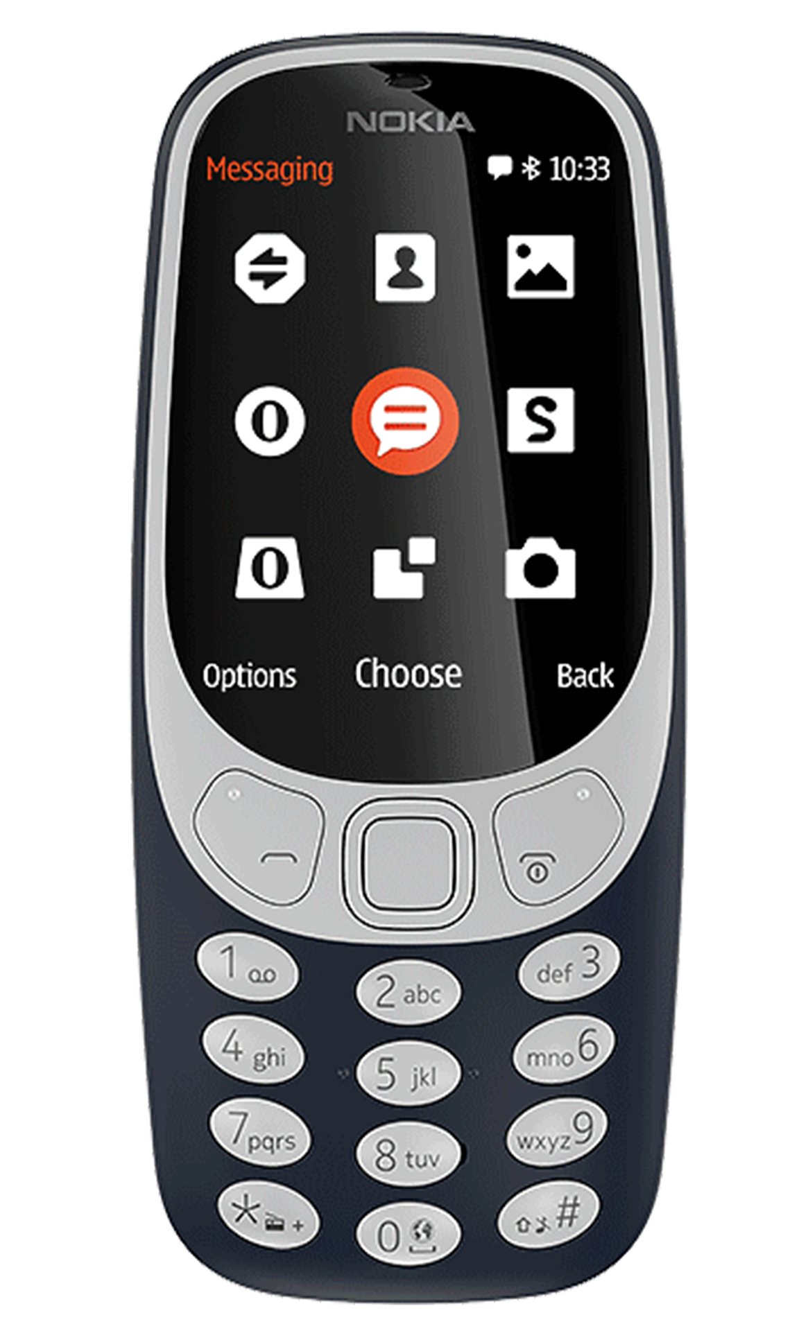 Nokia 3310